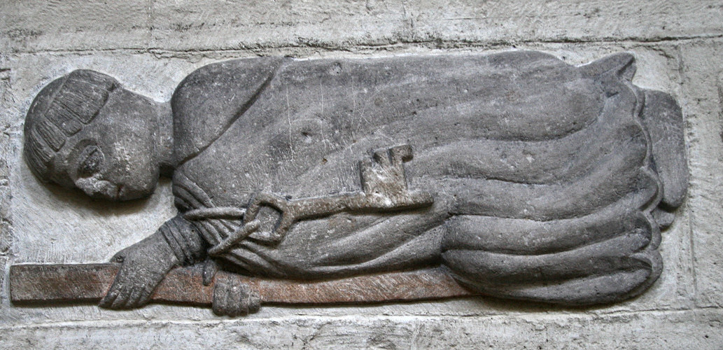 Beschreibung: Regensburg Mönchsrelief in der St. Jakob Kirche Quelle: selbst fotografiert Datum: Juni 2006 Fotograf: Karsten Dörre (grizurgbg)